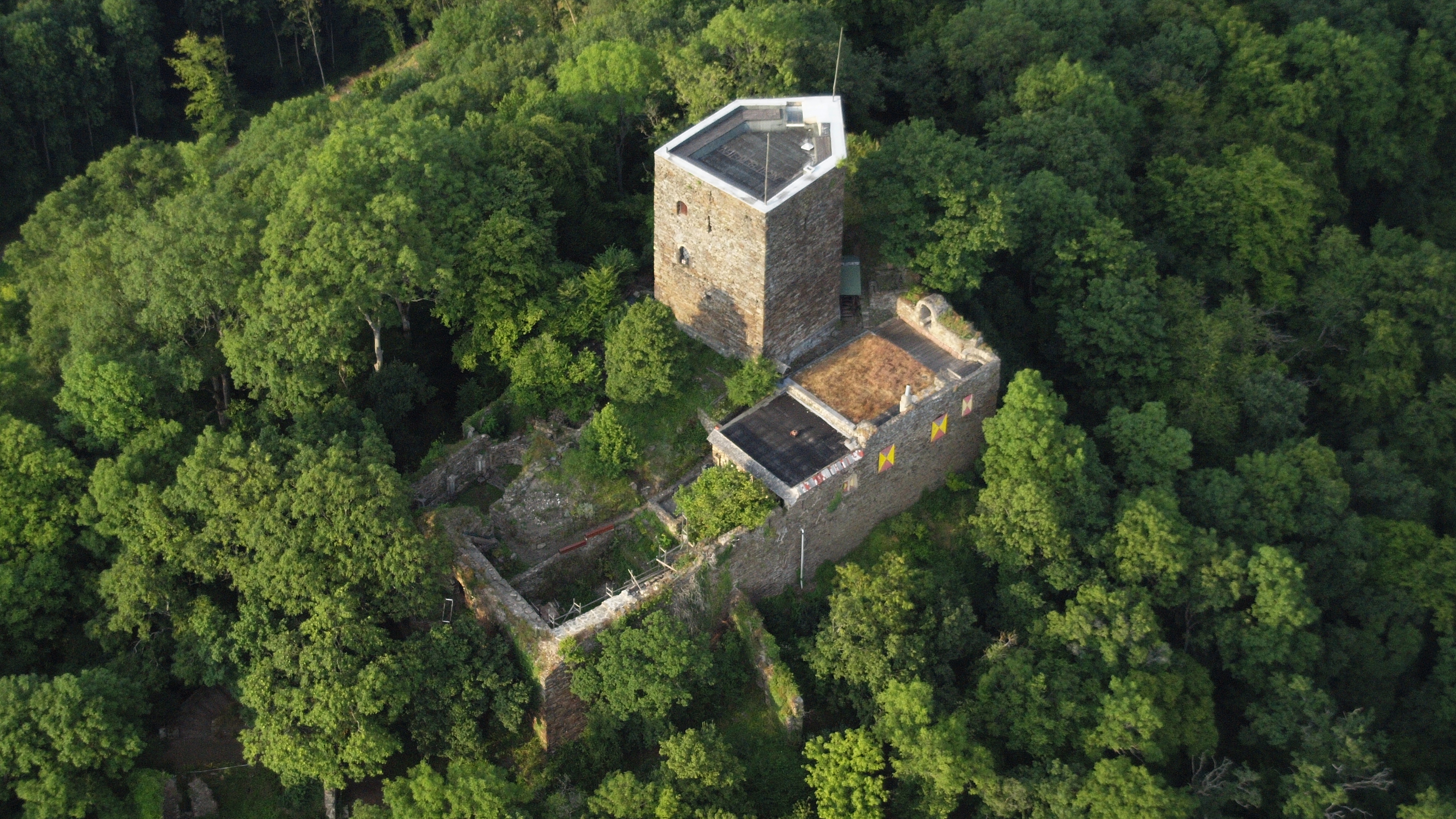 Neuerburg (Wied): Luftaufnahme